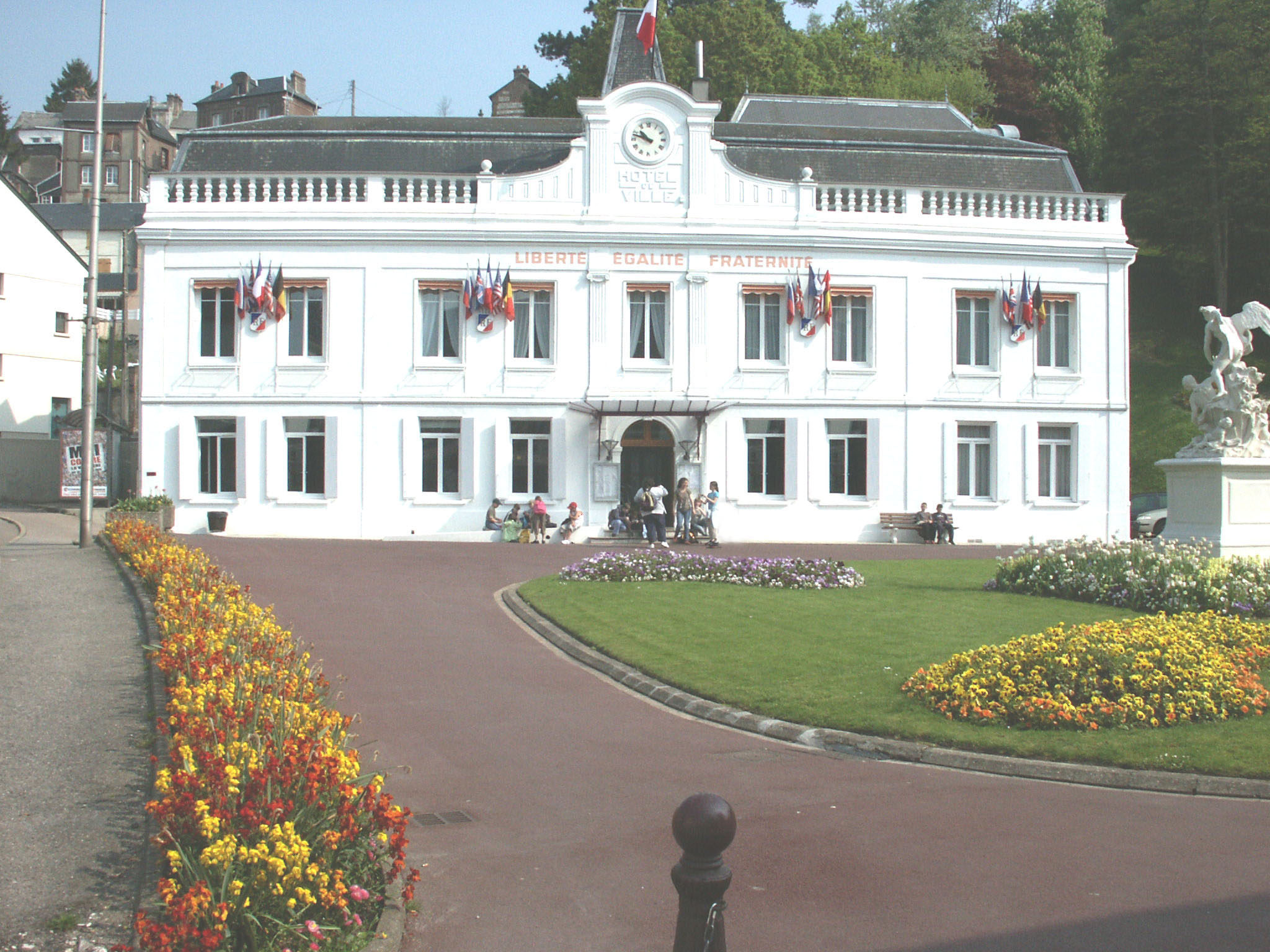 Mairie de Bolbec